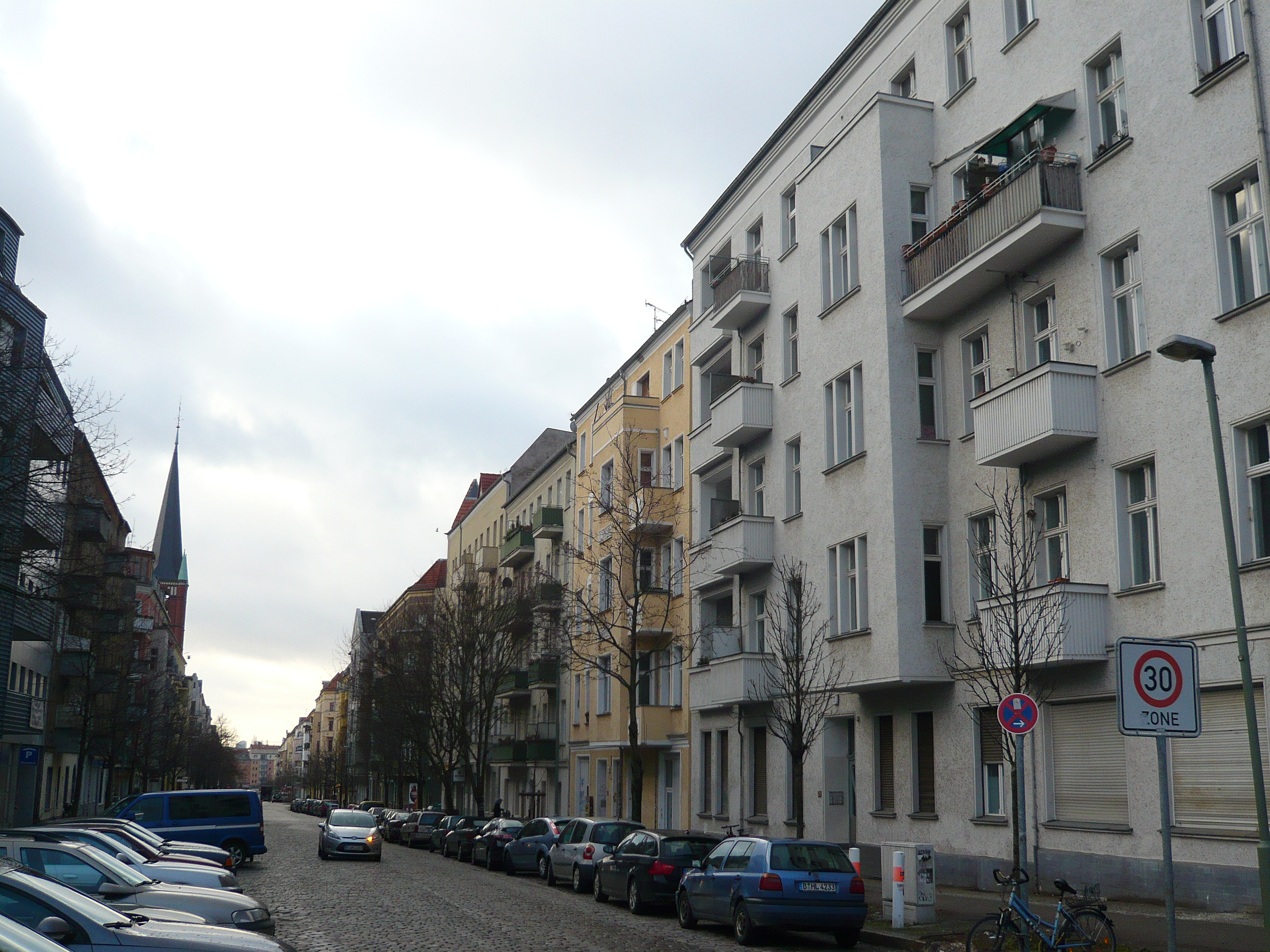 Straße in Berlin-Friedrichshain: Samariterstraße